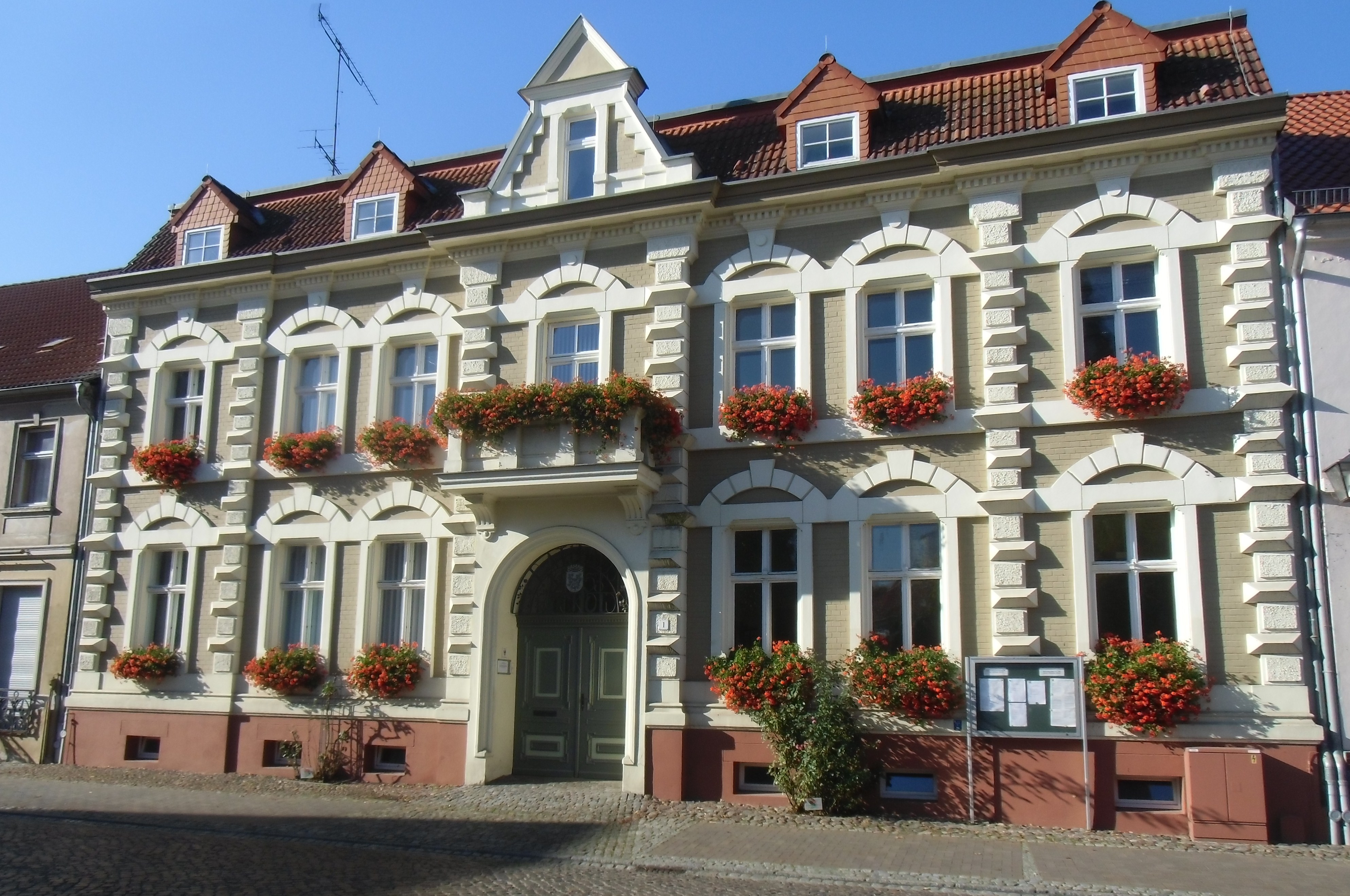 Rathaus in Hauptstraße 1, 15377 Buckow